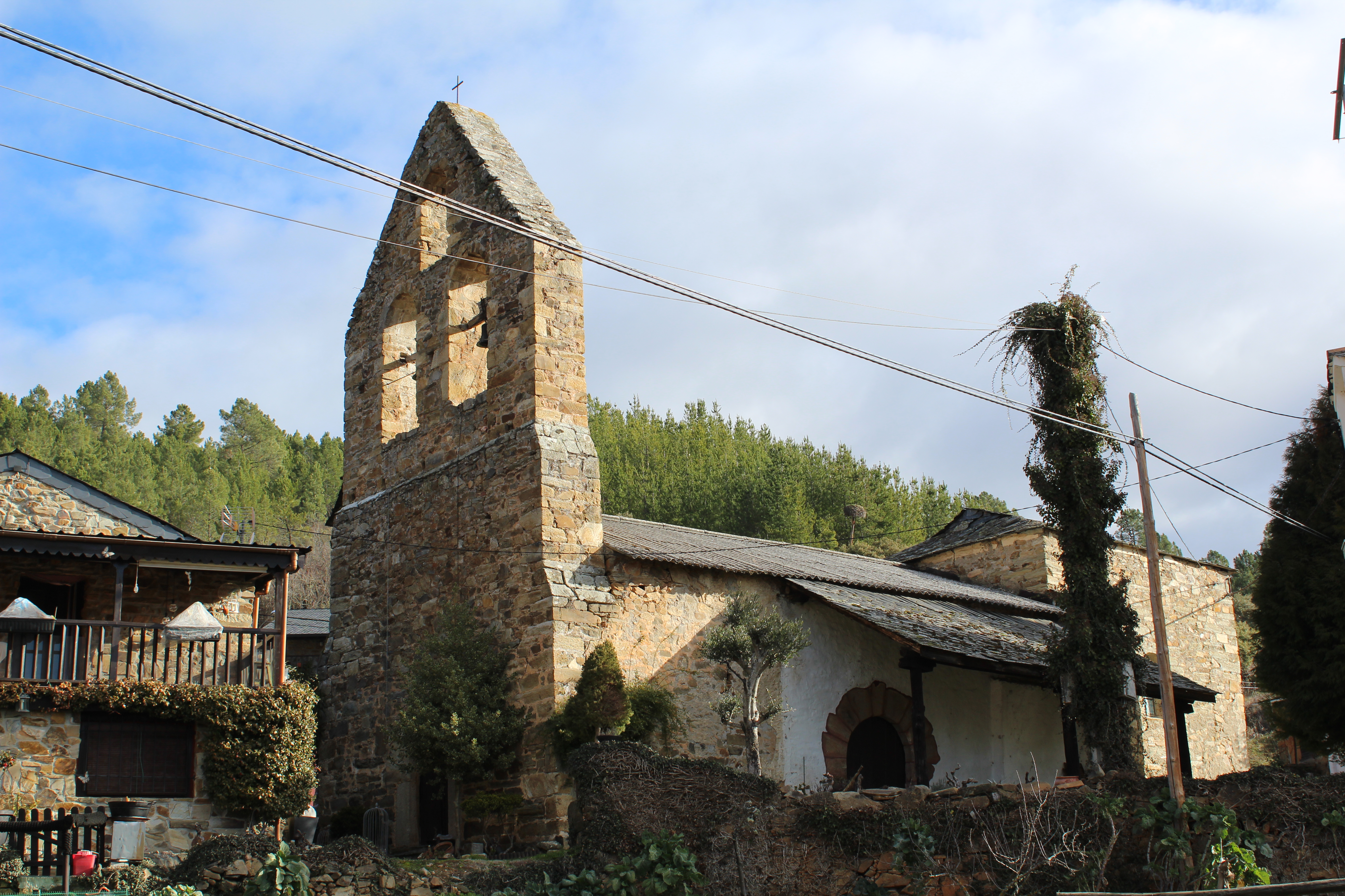 Campanario de la Iglesia de San Miguel de Arganza